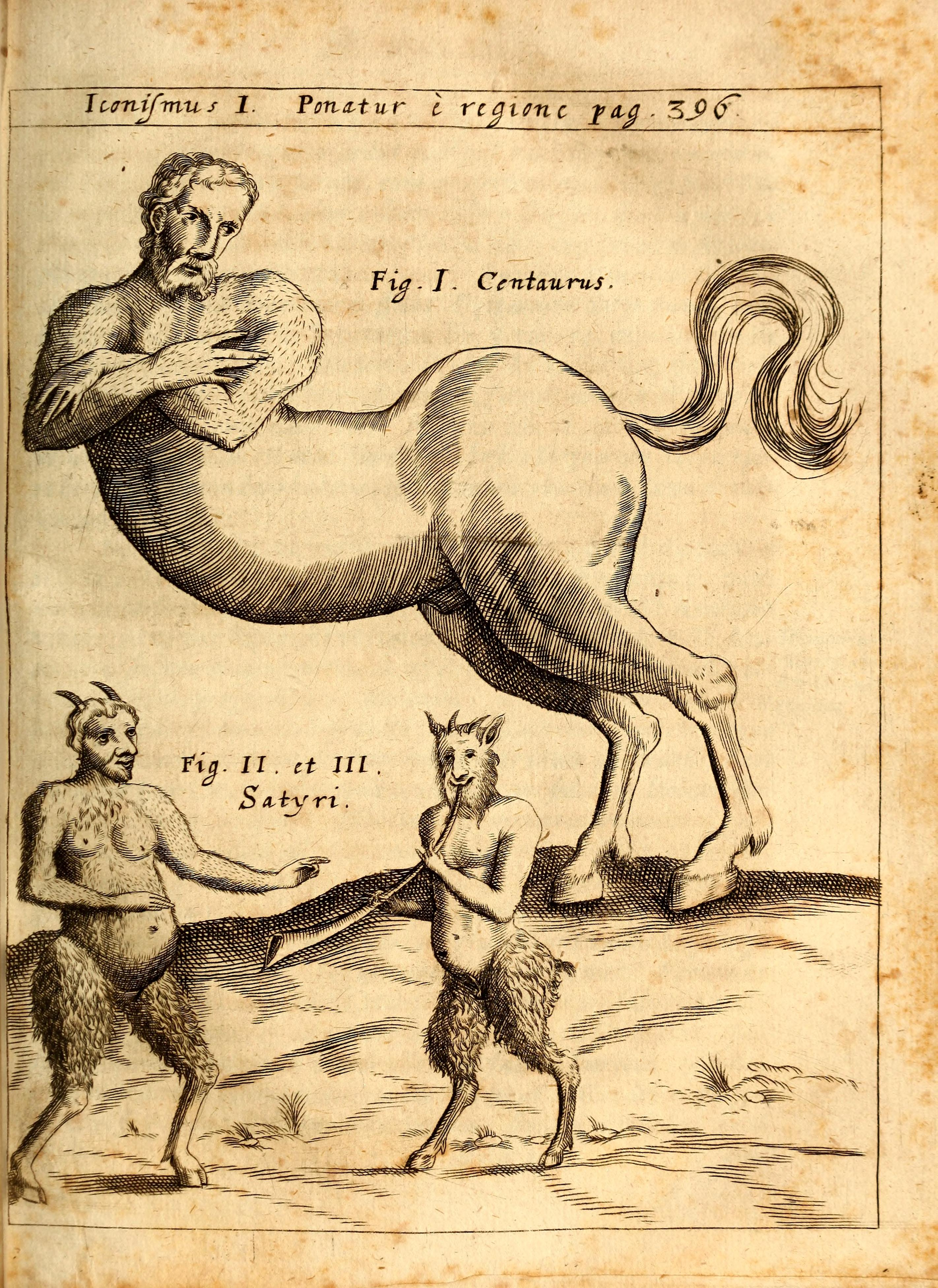 P. Gasparis Schotti, regis curtani ... Physica curiosa, sive, Mirabilia naturæ et artis libris XII. comprehensa : quibus pleraq[ue], quæ de angelis, dæmonibus, hominibus, spectris, energumenis, monstris, portentis, animalibus, meteoris, &c. rara, arcana, curiosaq[ue] circumferuntur, ad veritatis trutinam expenduntur : variis ex historia ac philosophia petitis disquisitionibus excutiuntur, & innumeris exemplis illustrantur ...